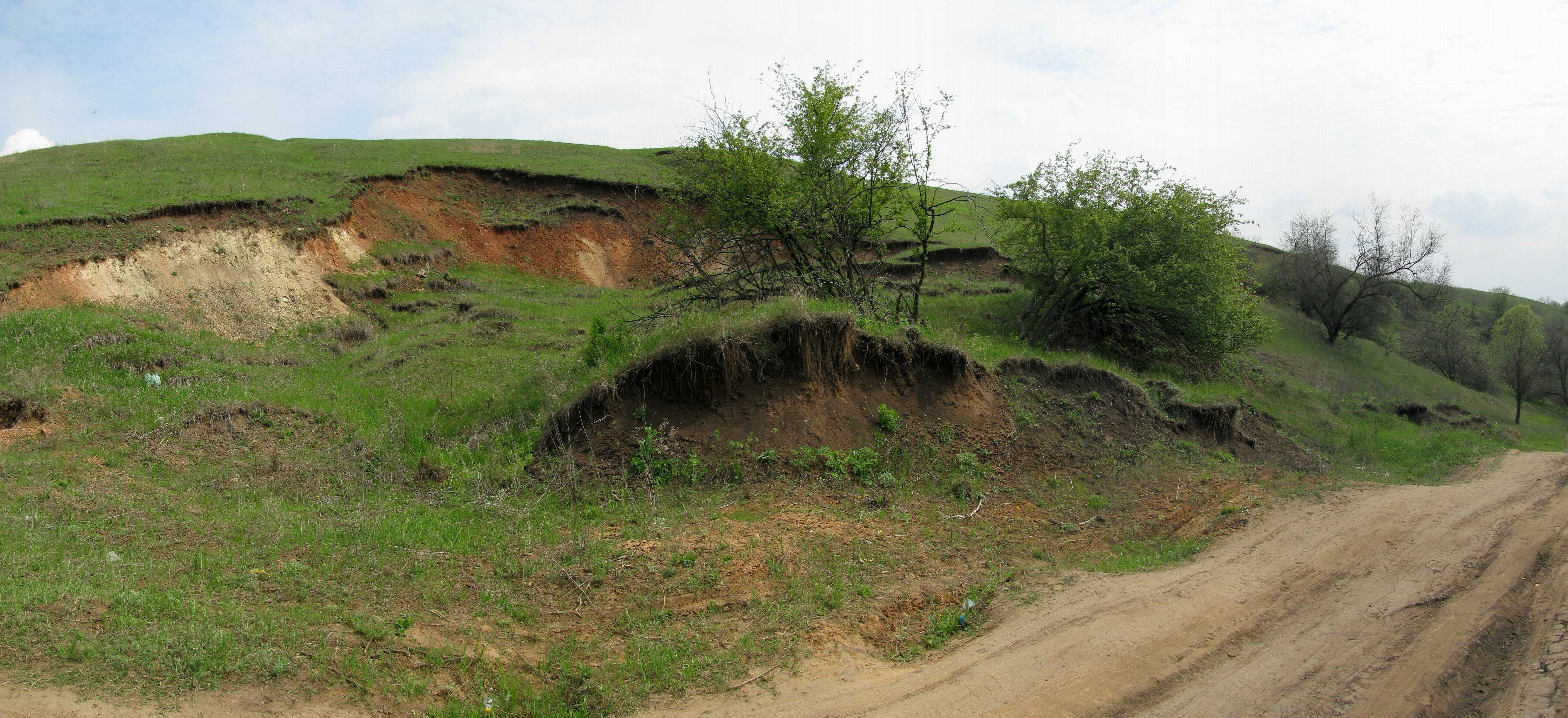 Старый оползень